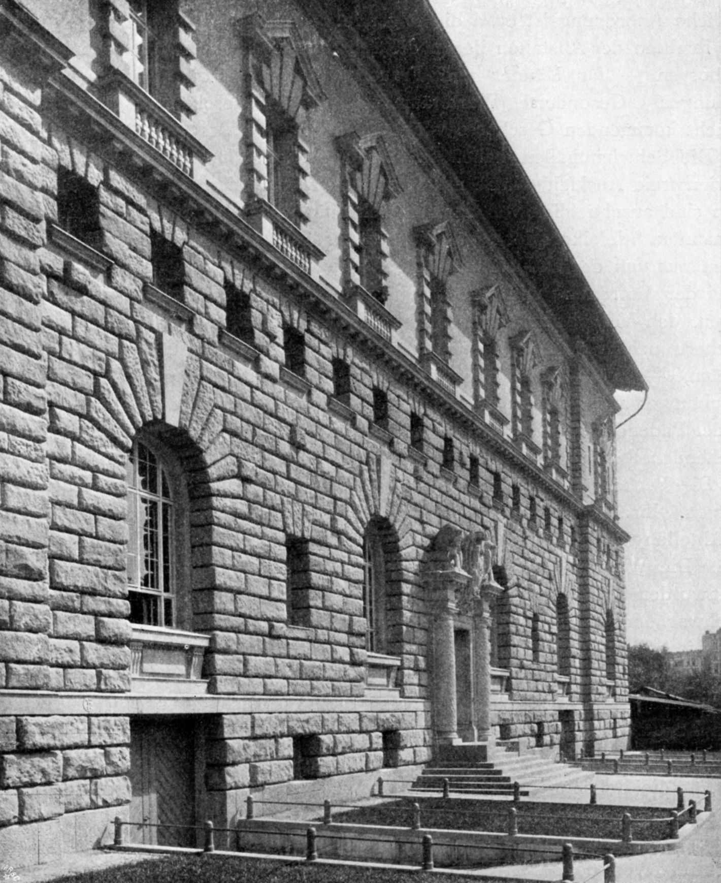 Volksbadeanstalt an der Baerwaldstraße in Berlin-Kreuzberg